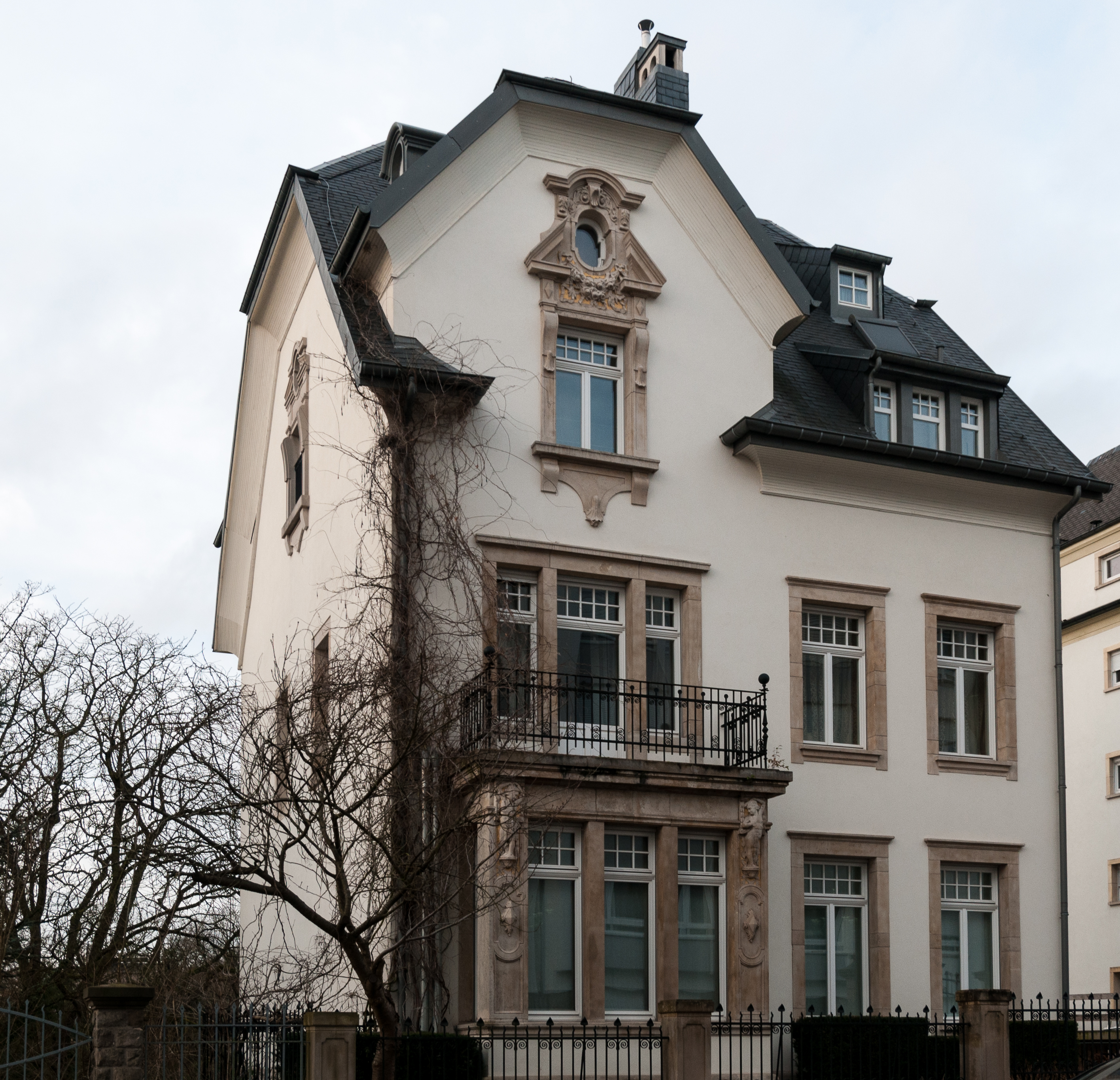 59, Boulevard de la Pétrusse an der Stad.